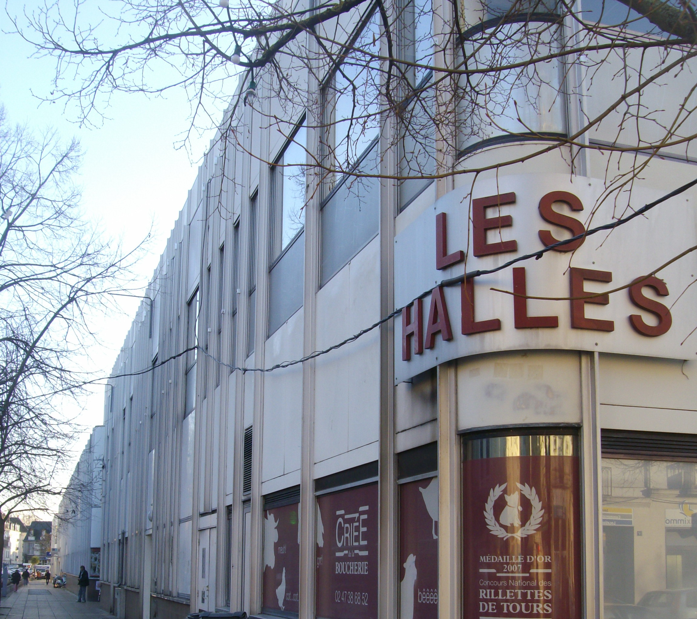 Halles de Tours